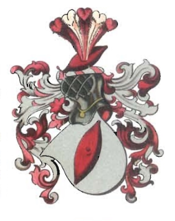 Erb Caltů z Kamenné Hory